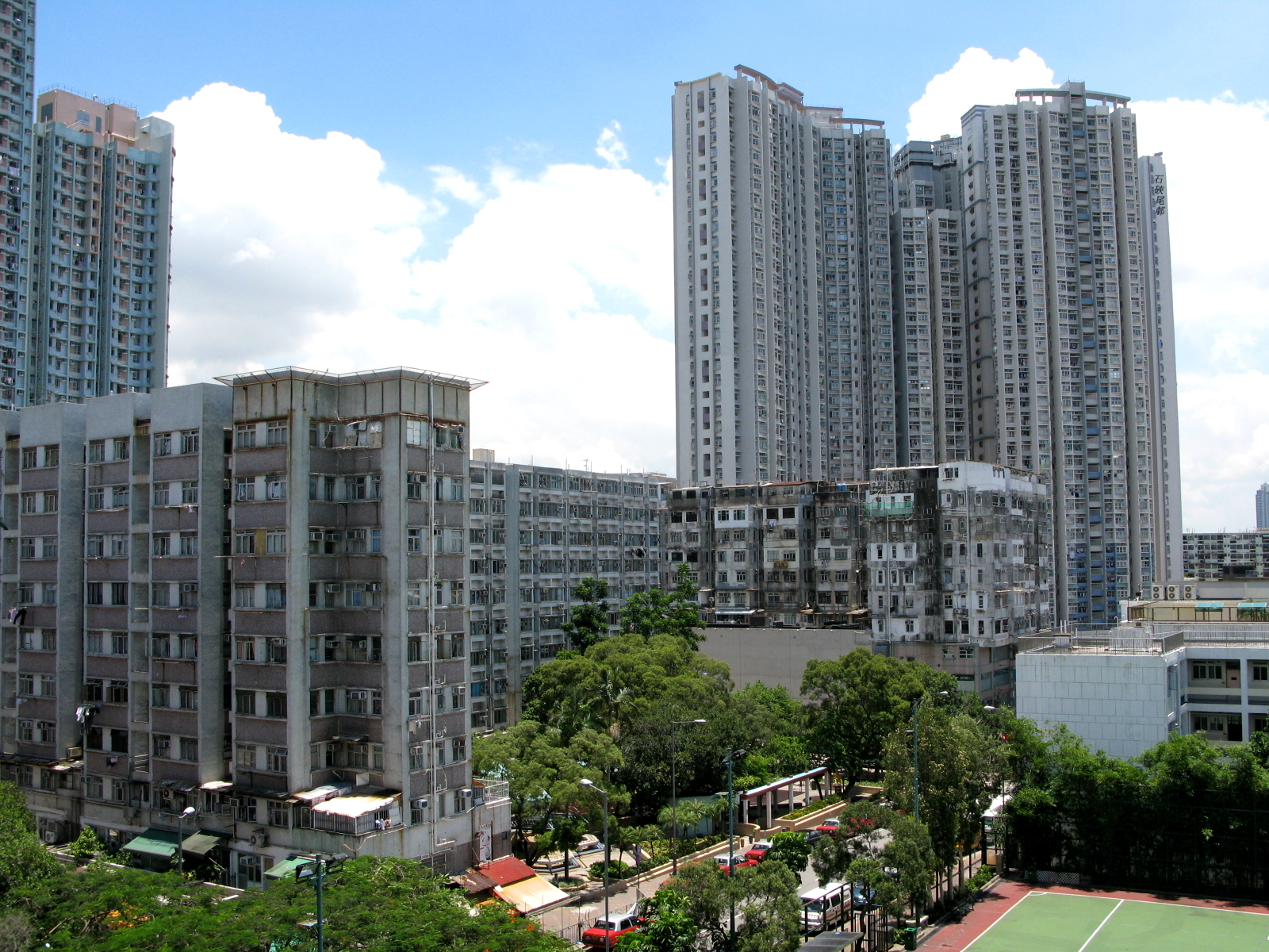 Shek Kip Mei Buildings